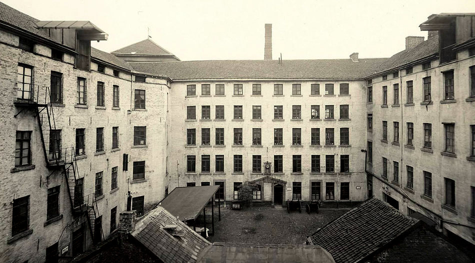 Fotografie der Tuchfabrik Marx & Auerbach in Aachen um 1920